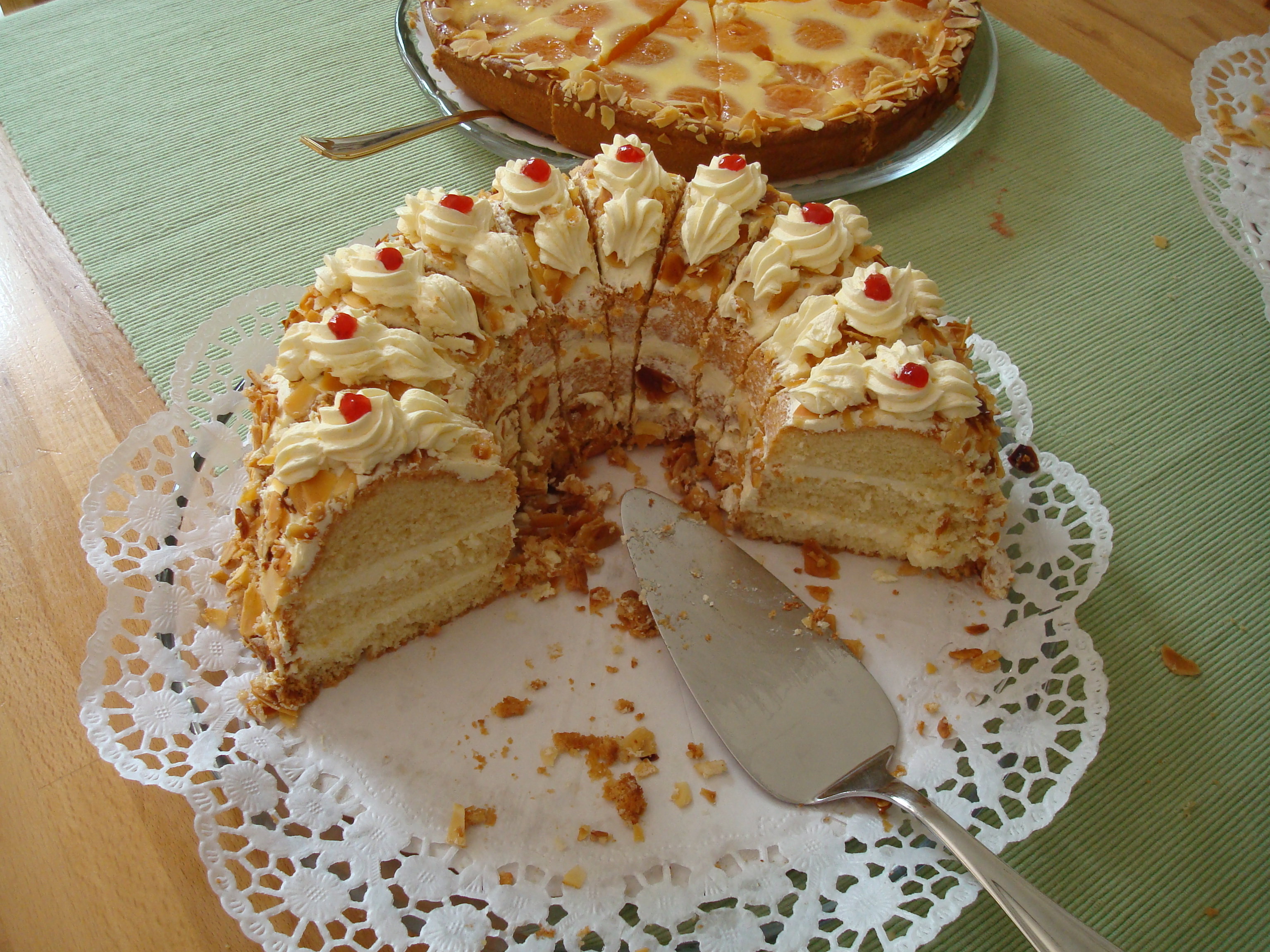 deutsche Kuchenspezialität: Frankfurter Kranz, gateau